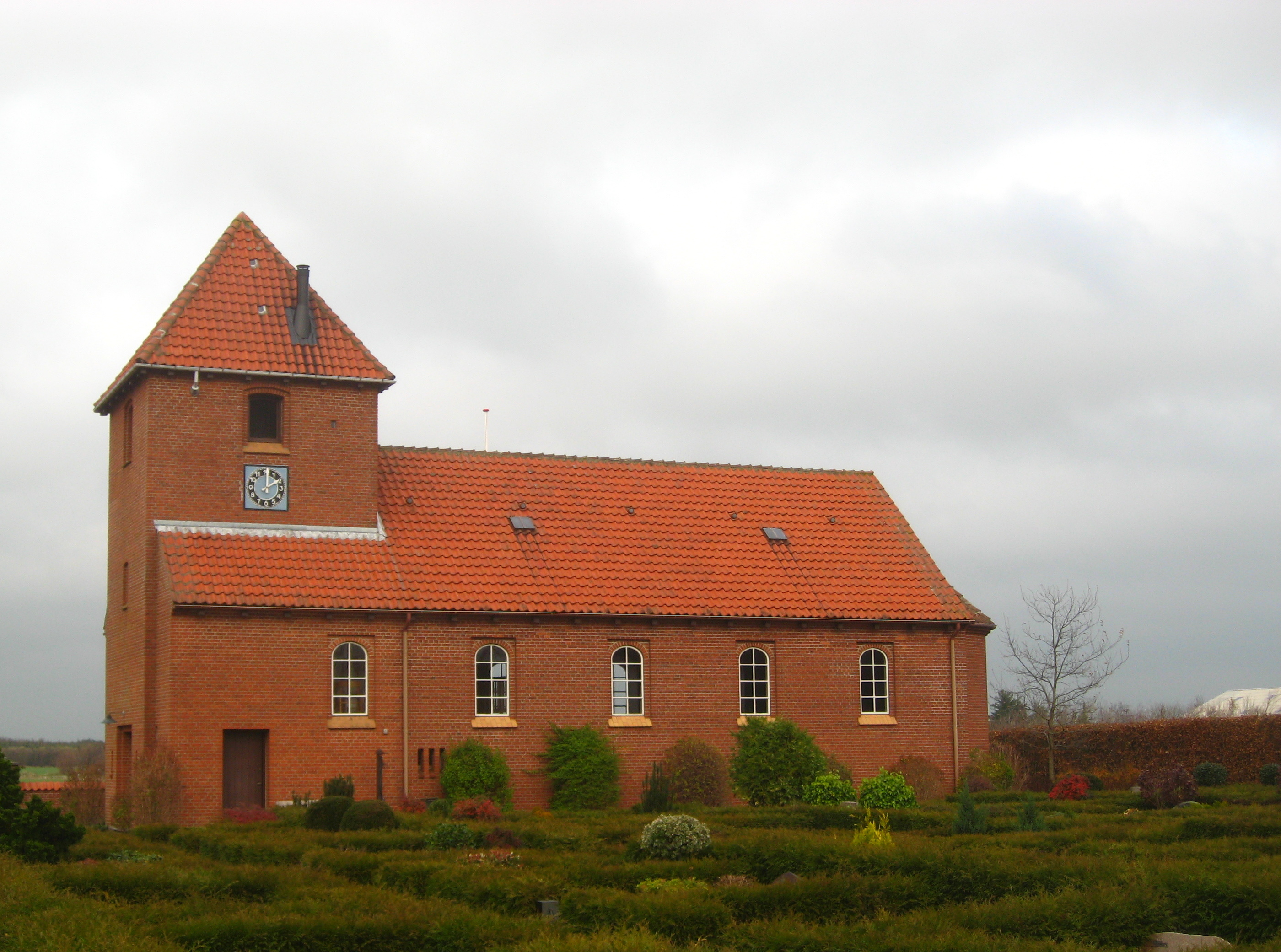 Vittrup Kirke (Børglum Sogn, Hjørring Kommune)